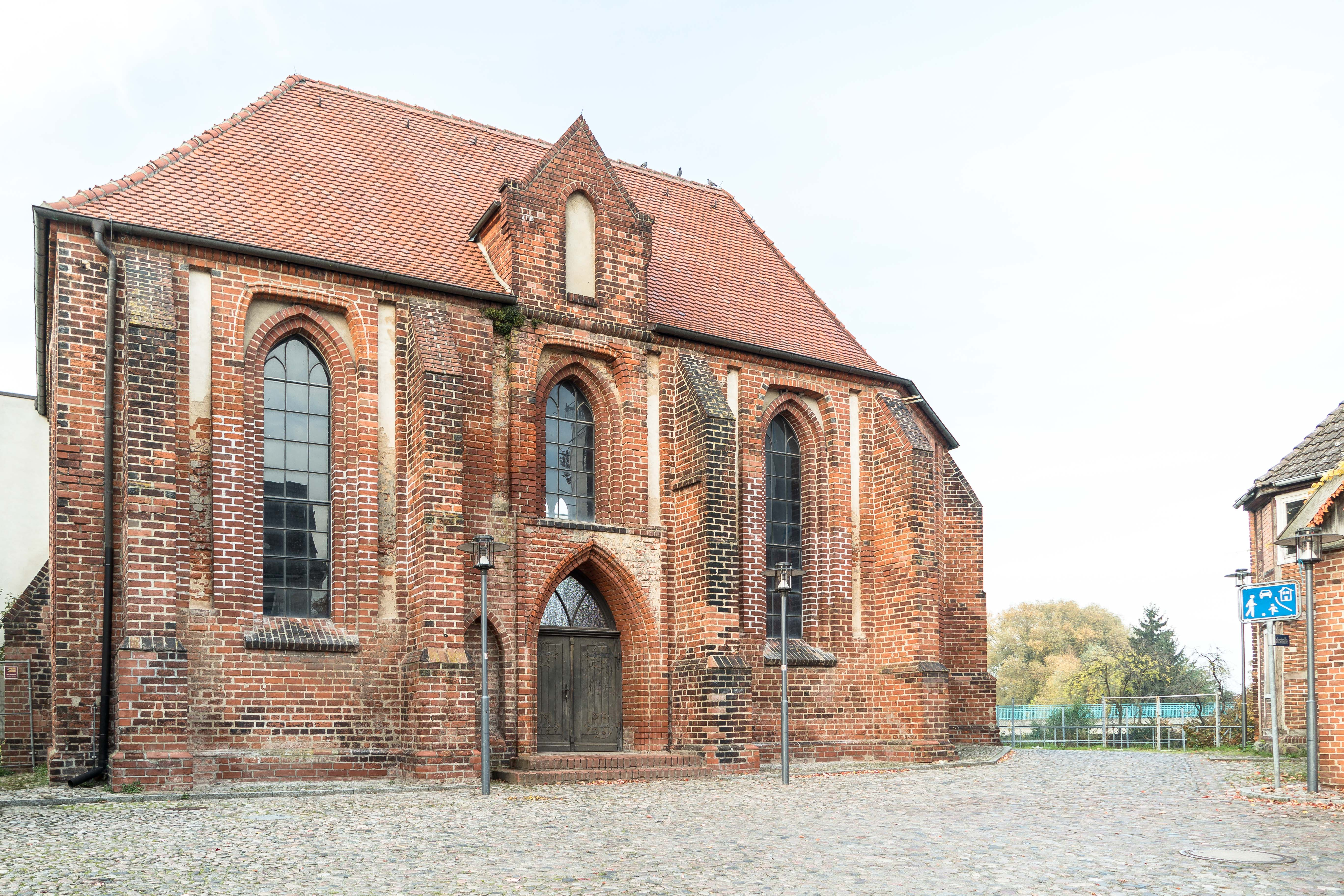 Salzkirche in Seehausen